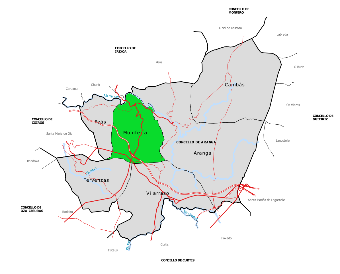 Mapa da parroquia de Muniferral no concello de Aranga (Galiza).